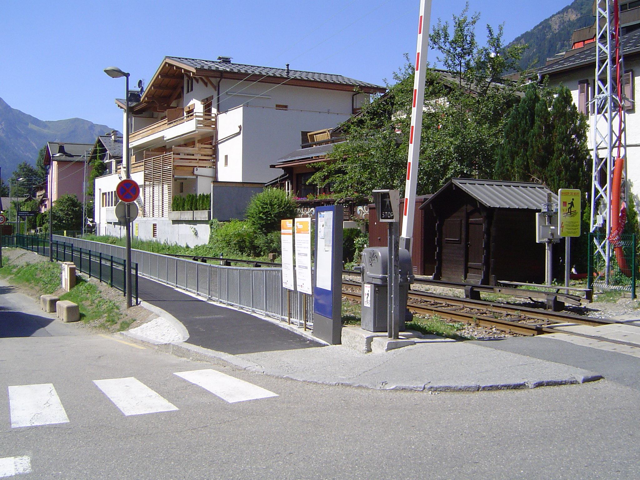 Photo de la halte SNCF "Chamonix - Aiguille du Midi" à Chamonix-Mont-Blanc (France)